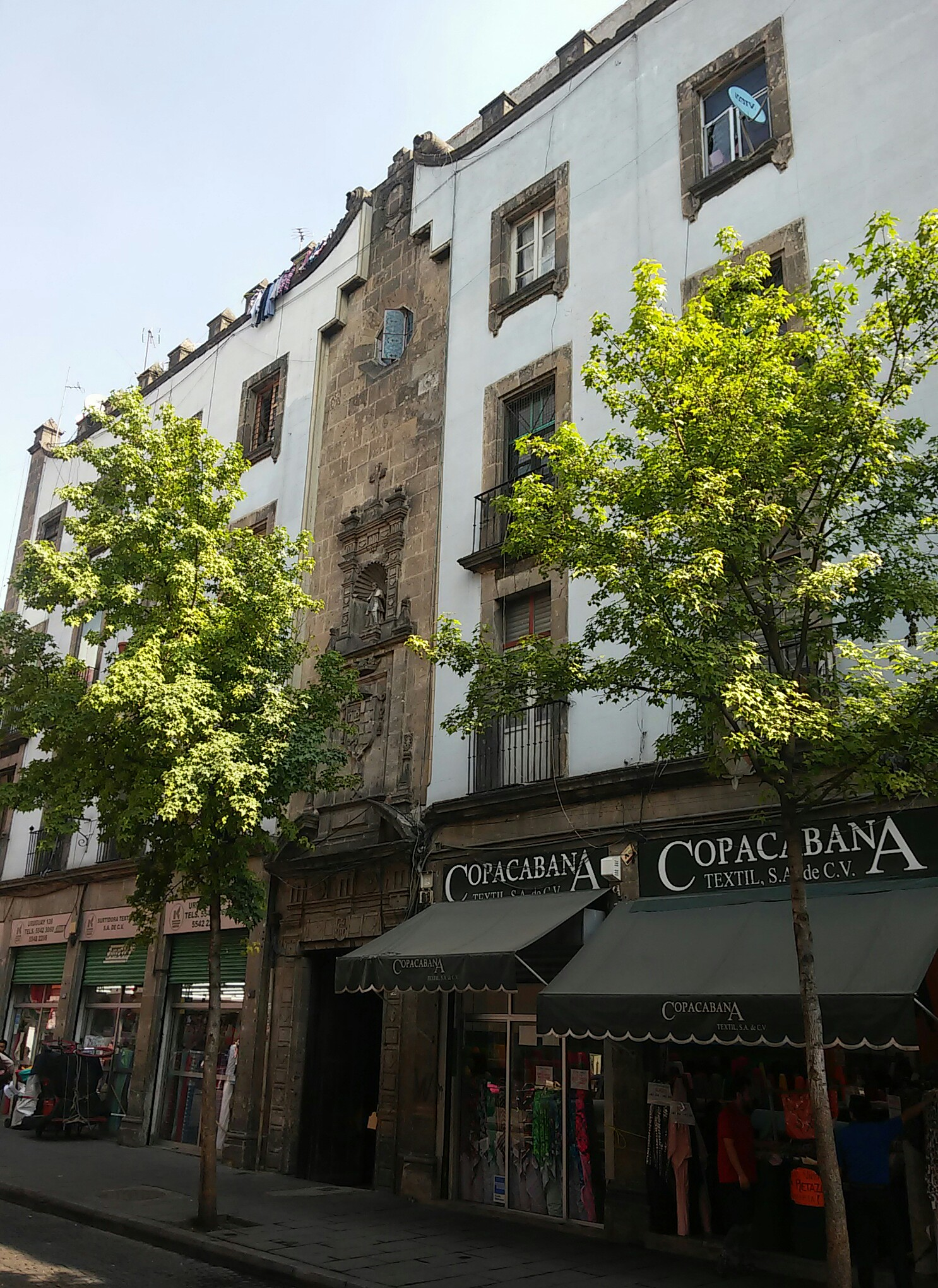 Fachada del antiguo colegio de San Ramón en el barrio de la Merced, ciudad de México